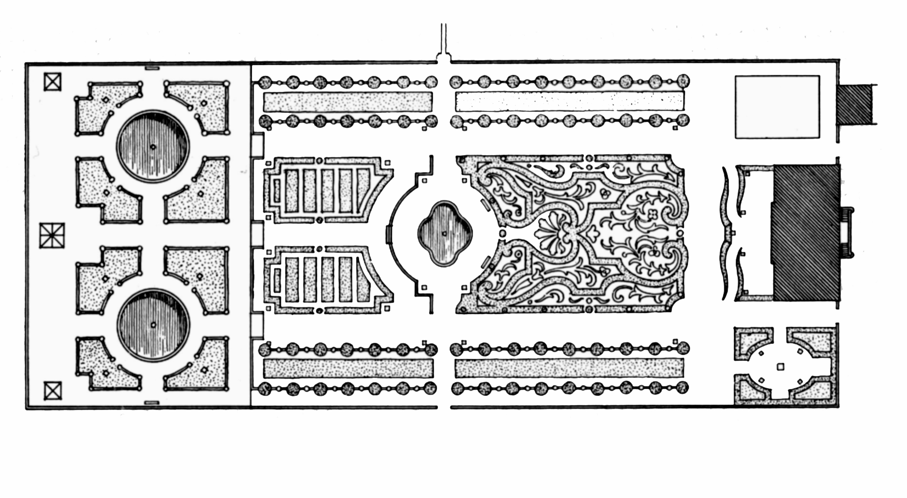 Wenken Französischer Garten Entwurf André LeNôtre 1737.jpg